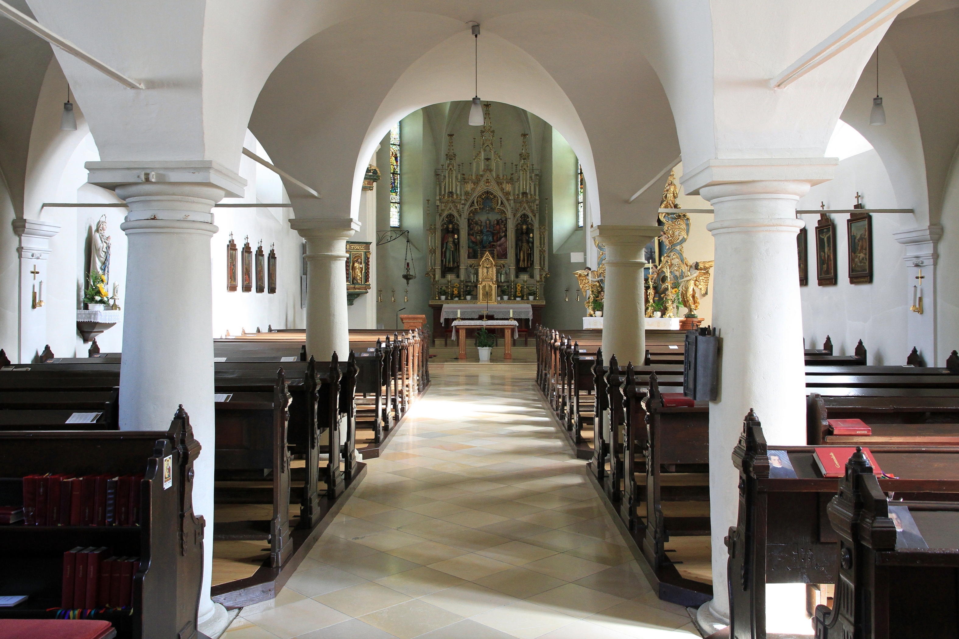 Innenansicht der katholischen Pfarrkirche hl. Geist in der burgenländischen Marktgemeinde Neckenmarkt. Im Vordergrund die vier toskanischen Säulen des tiefen Empore. Im Bildzentrum der neogotische Hochalter, geschaffen von Ferdinand Stufesser aus St. Ulrich in Gröden im Jahr 1913.